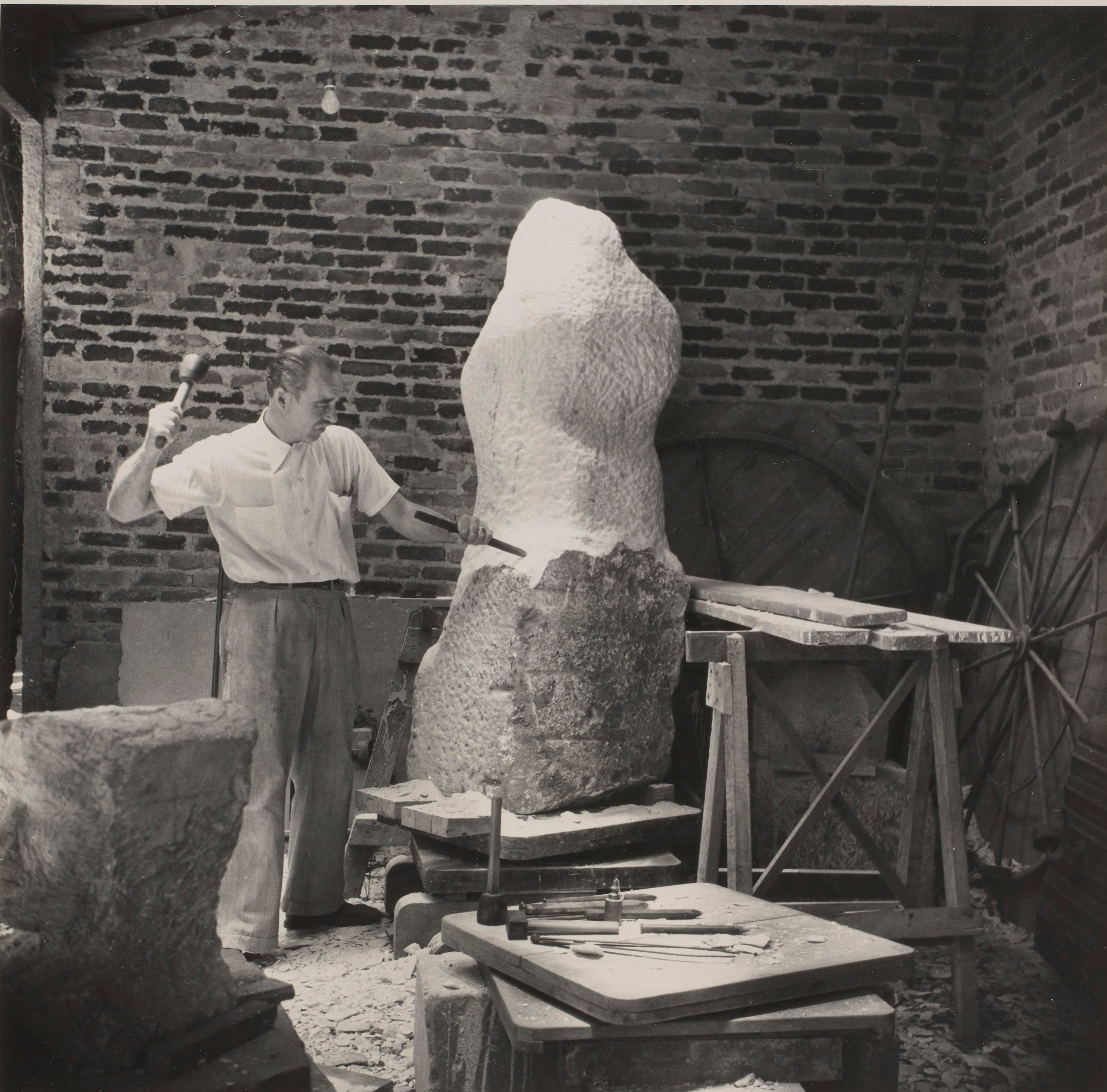 August Zamoyski przy pracy